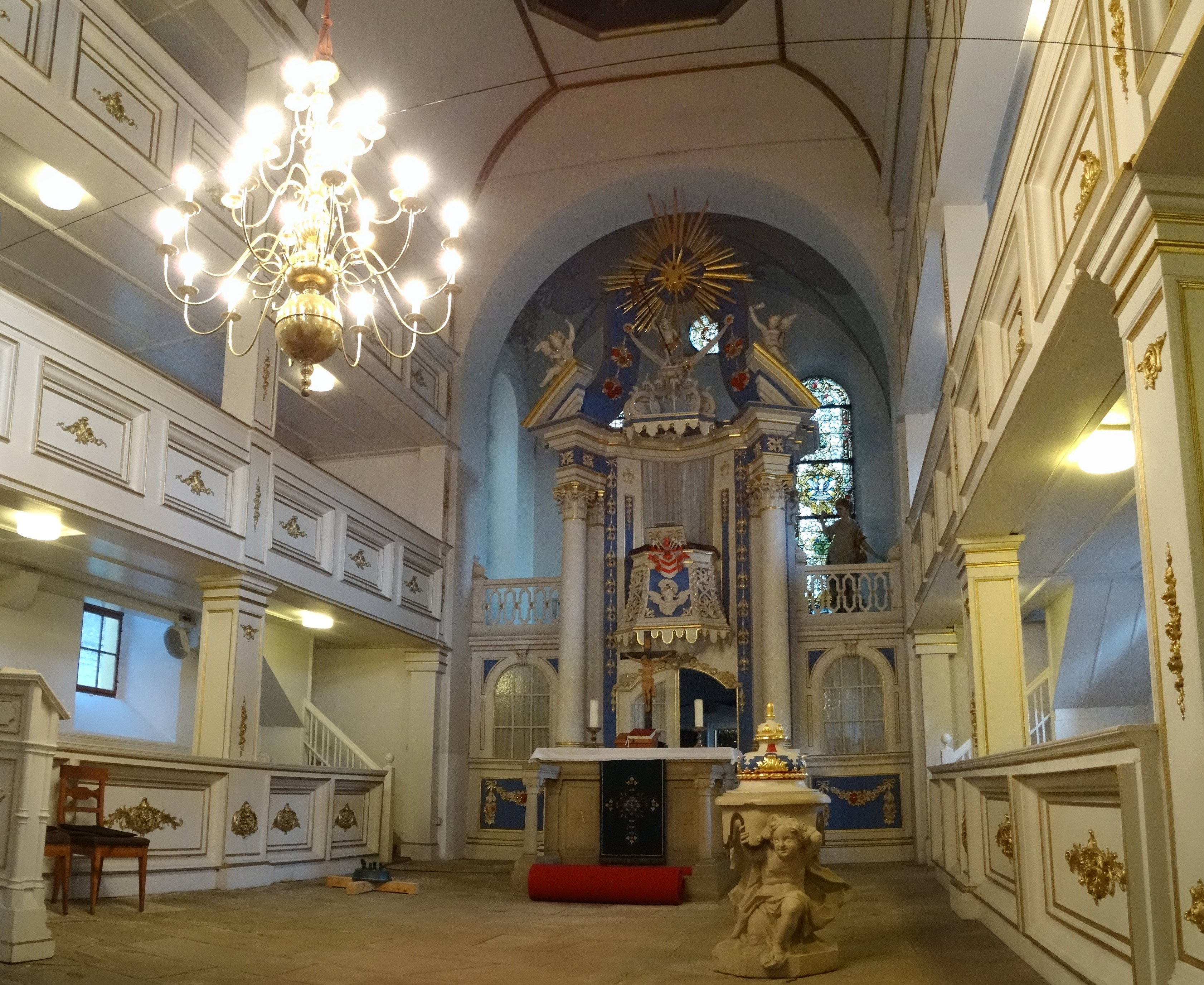 Der barocke Kanzelaltar ist von einer die Siegesfahne haltenden Christusfigur gekrönt. Der Kanzelkorb trägt das Wappen derer von Witzleben.